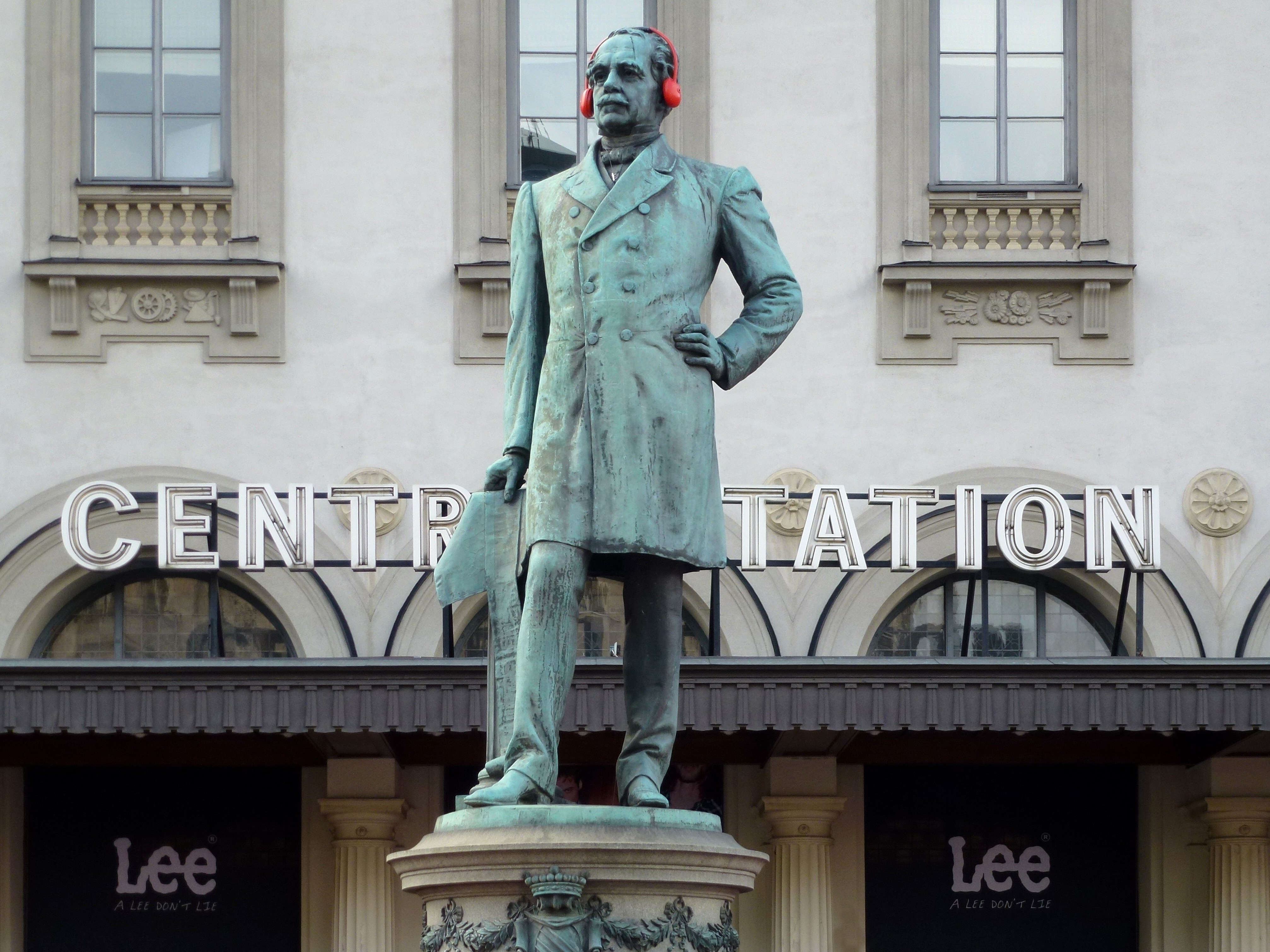 Stockholms central Nils Ericson